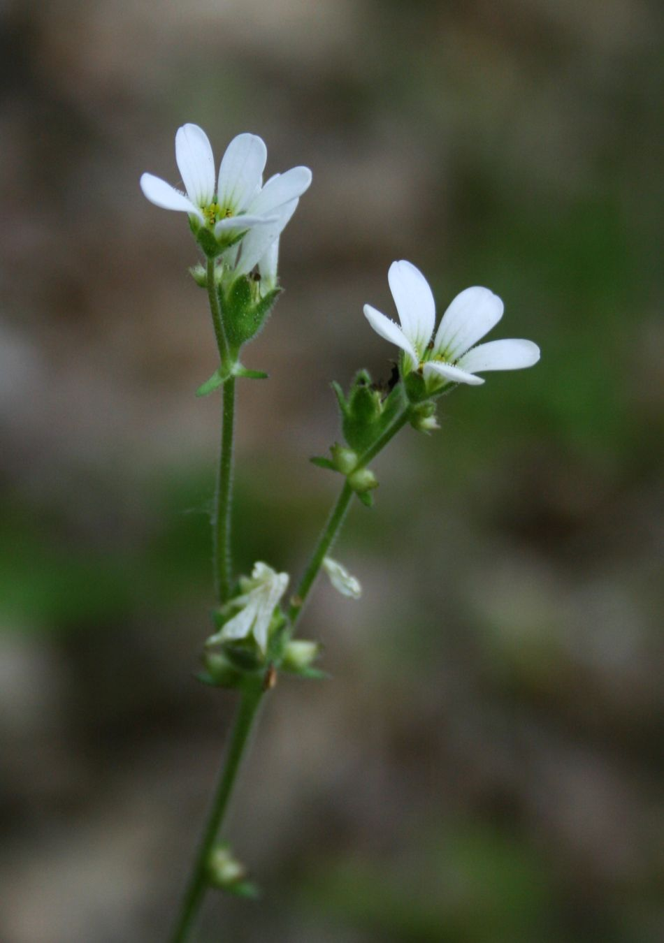 Zwiebel-Steinbrech (Saxifraga bulbifera), Steinbrechgewächse (Saxifragaceae) - Italien/Italia/Italy: Toscana, Prov. Lucca, Garfagnana, Piazza al Serchio